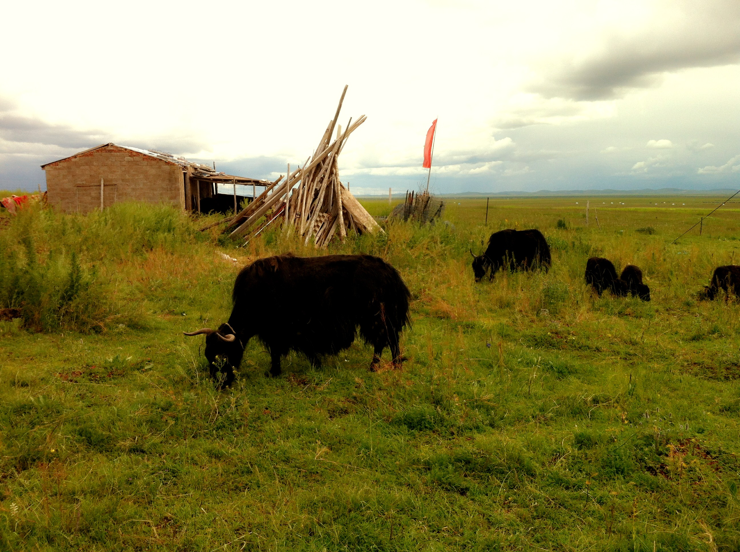 ，天高云阔